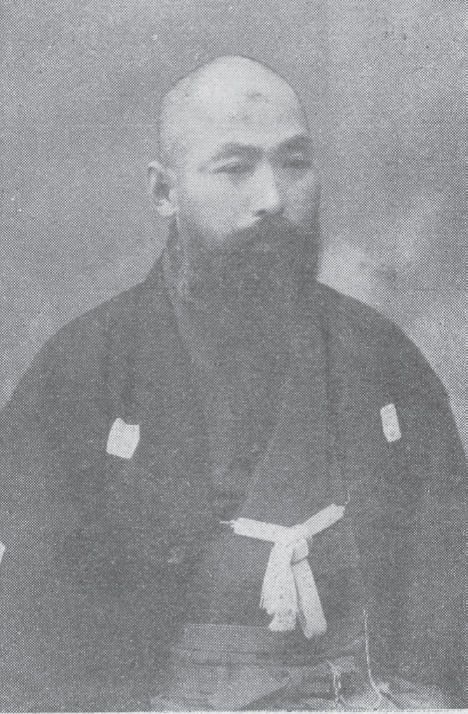 松本龜太郎，土佐安藝郡出身，北投溫泉、製陶、觀光等產業先驅。